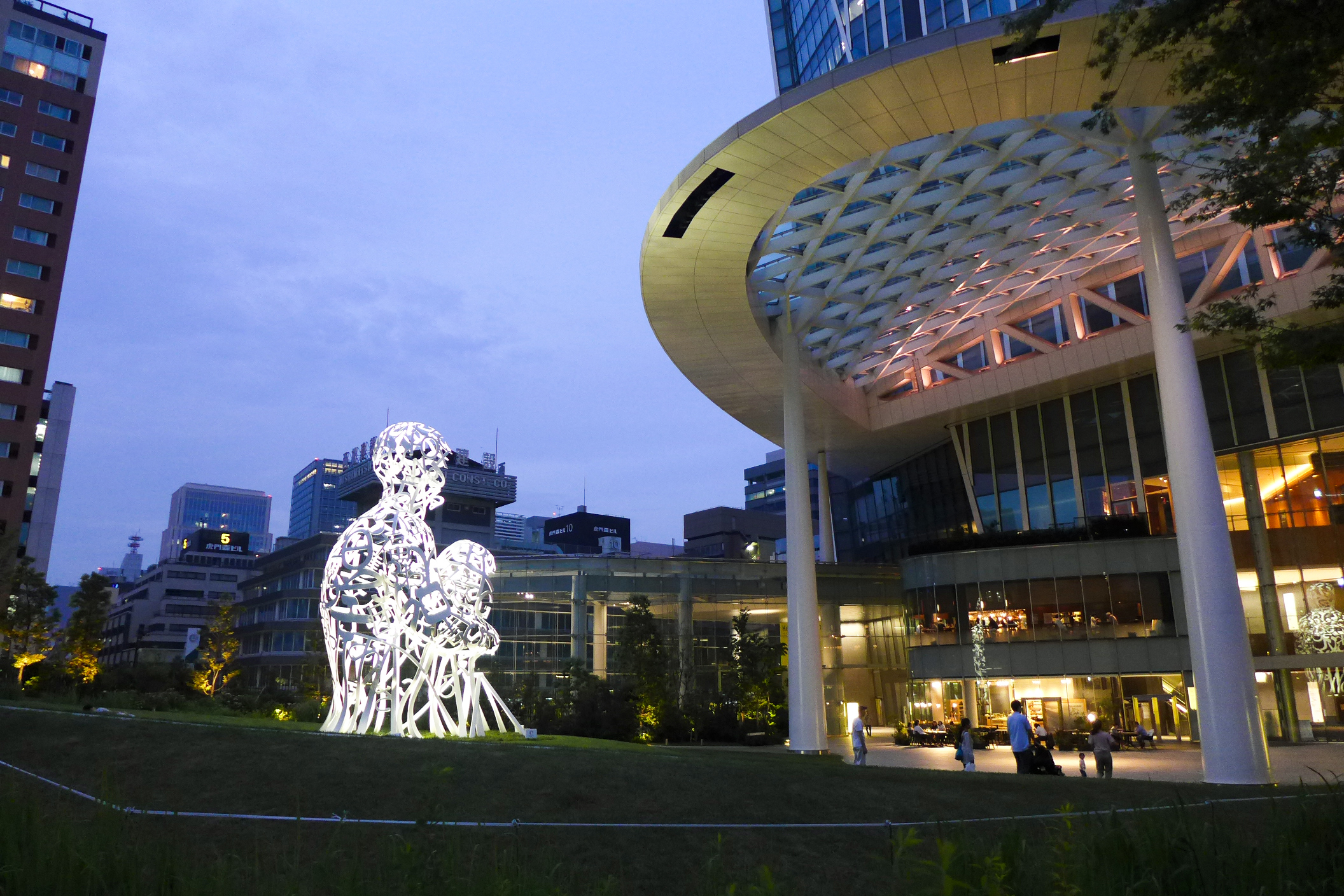 Toranomon Hills Oval Plaza